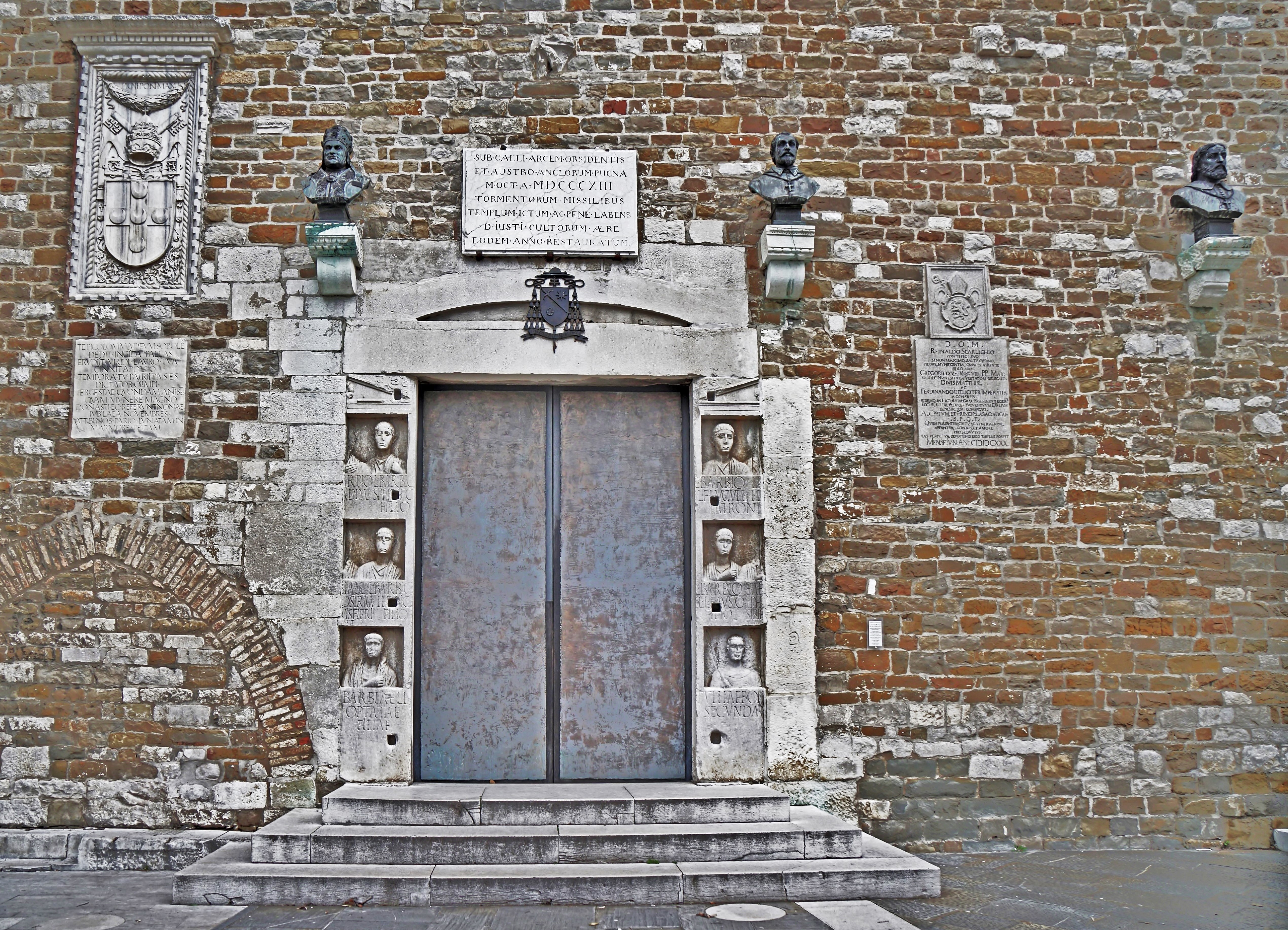 Portal der Kathedrale San Giusto (Triest)